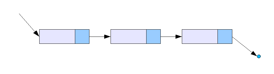 Single linked list.